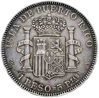 1895 Puerto Rico peso reverse